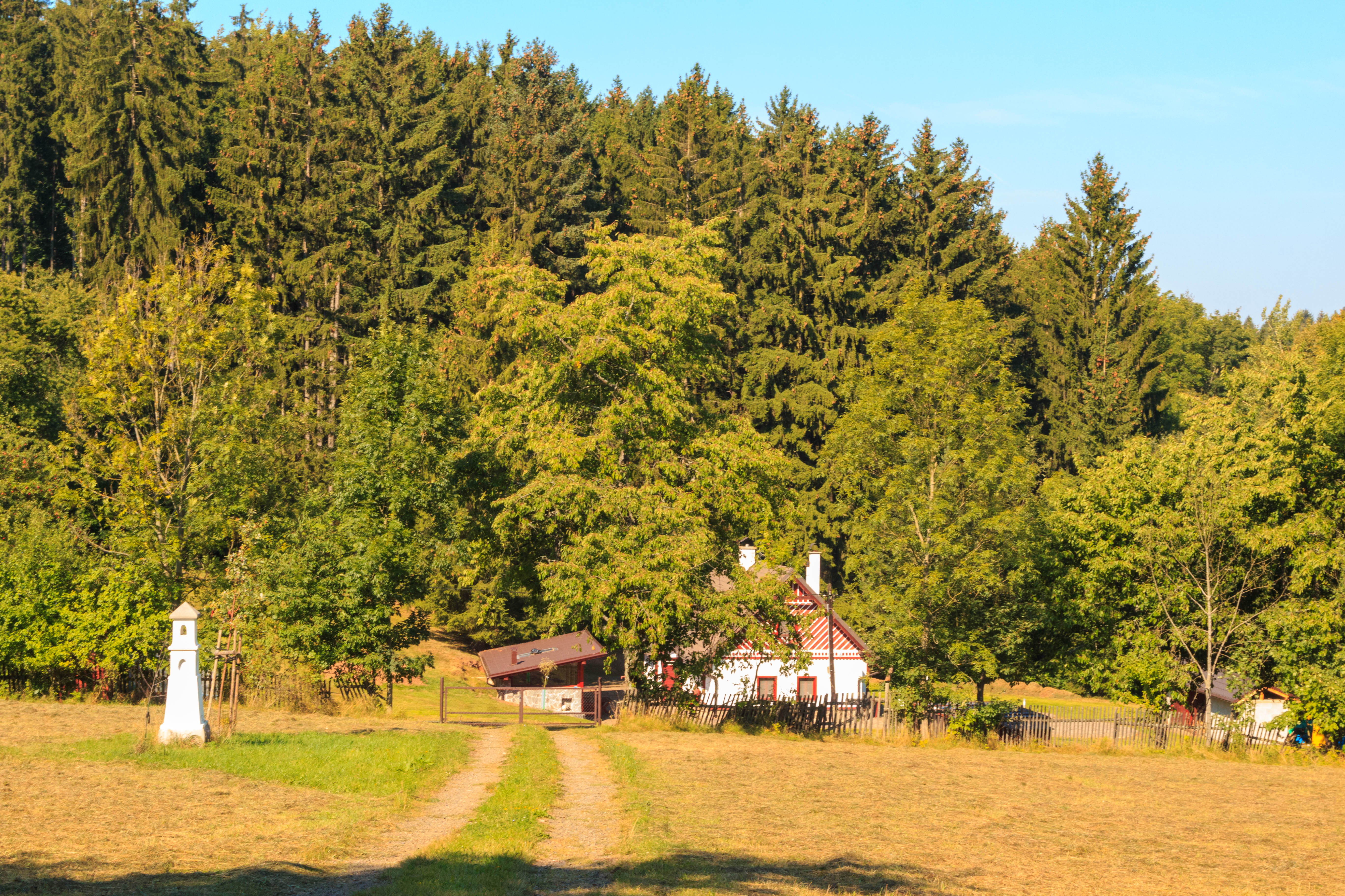 Bítouchov u Veselé čp. 17